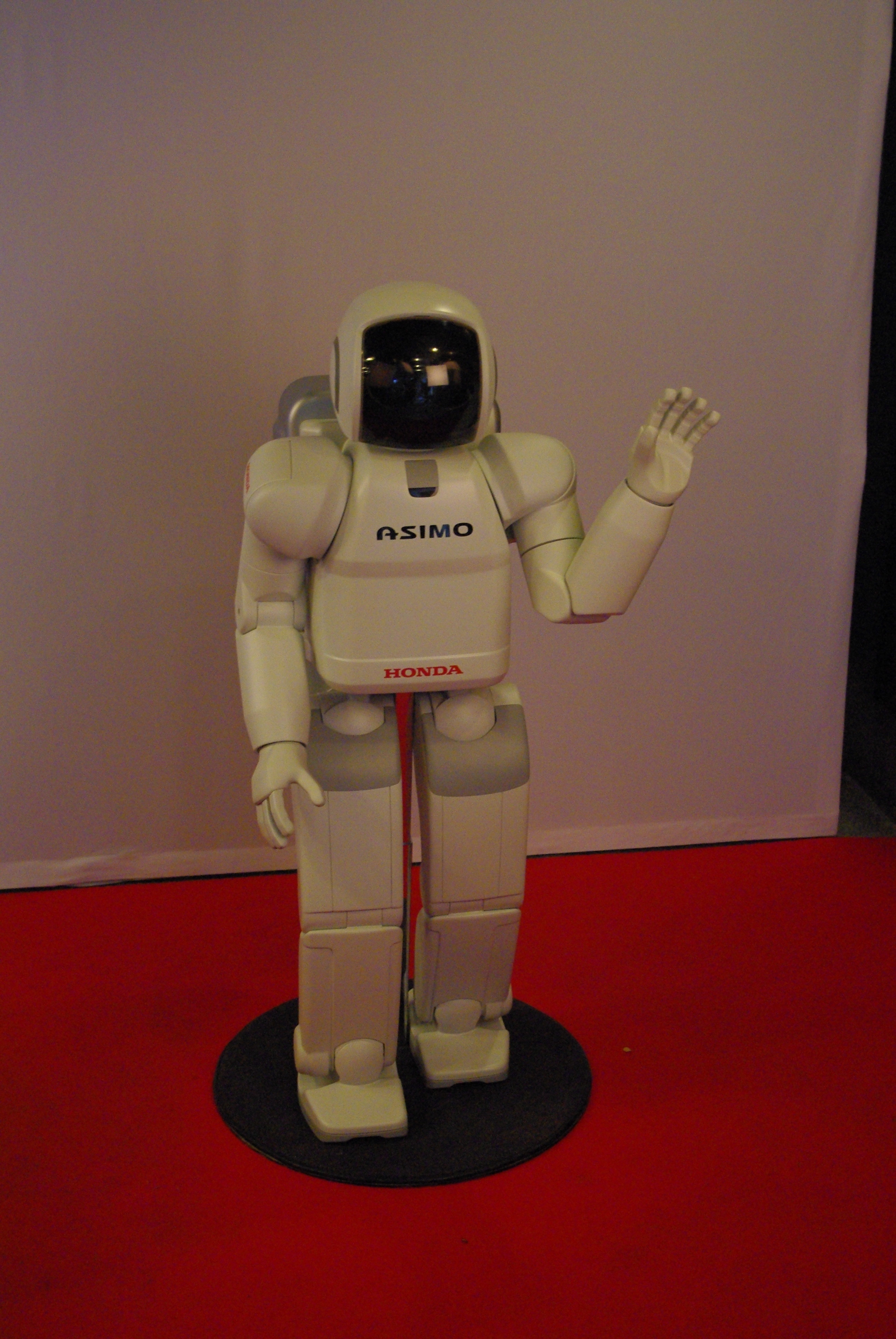 Asimo pendant le festival japonais de Gen�ve le 7 octobre 2012